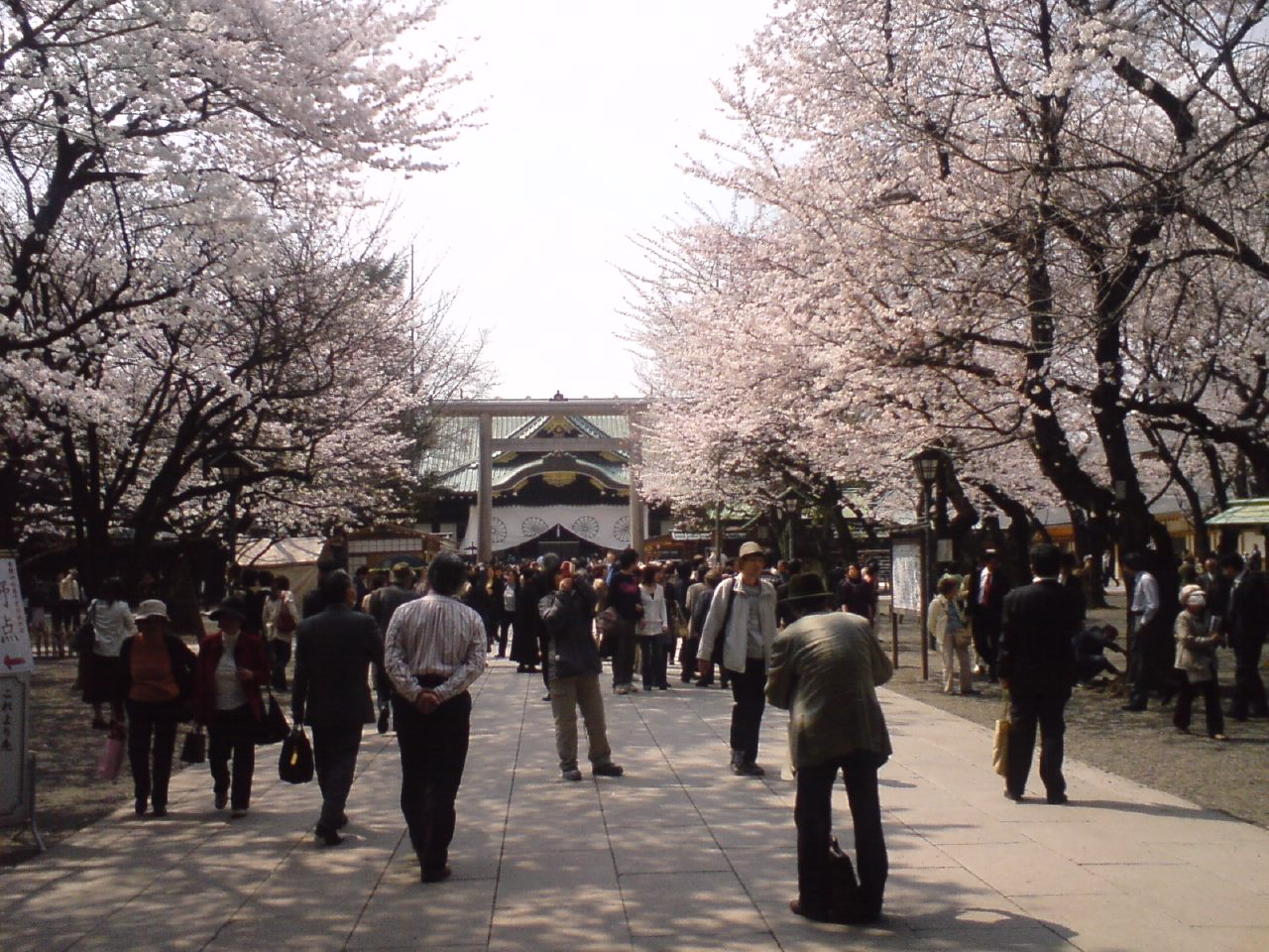 桜が咲き誇る靖国神社の境内。